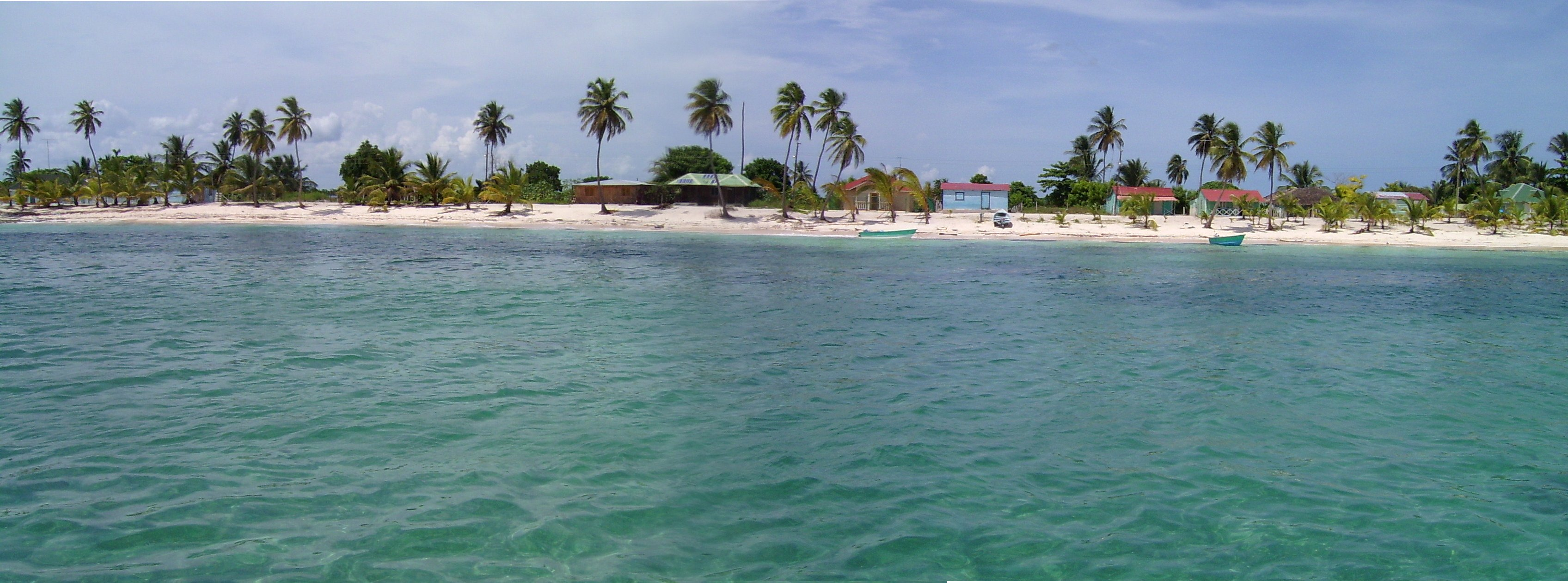 Vista de l'Illa Saona, República Dominicana, des del mar. Agost 2005.